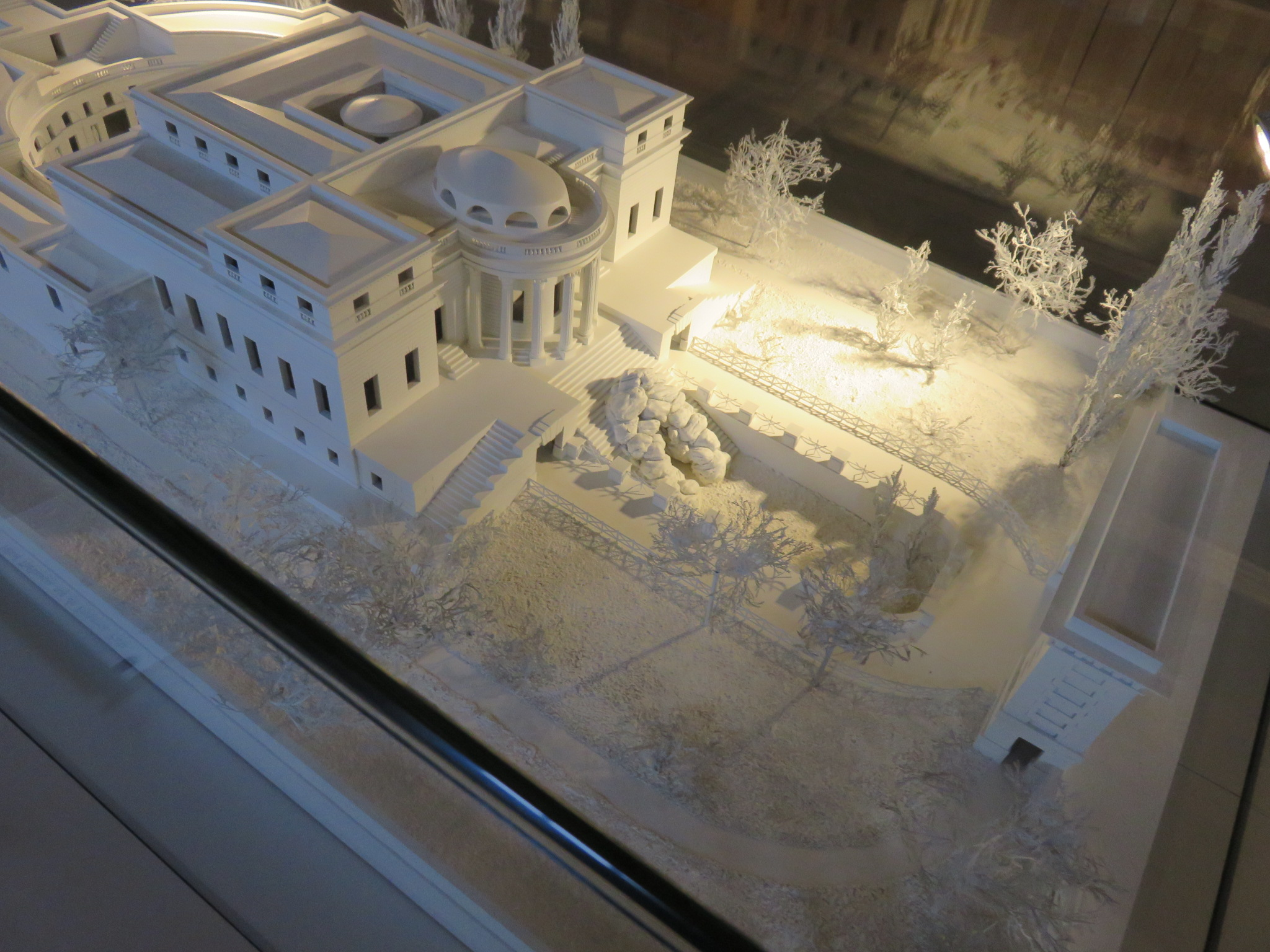 Musée Claude-Nicolas Ledoux d'Arc-et-Senans, maquette de l'ancien Hôtel Thellusson, pour madame Georges-Tobie Thélussion, 1778